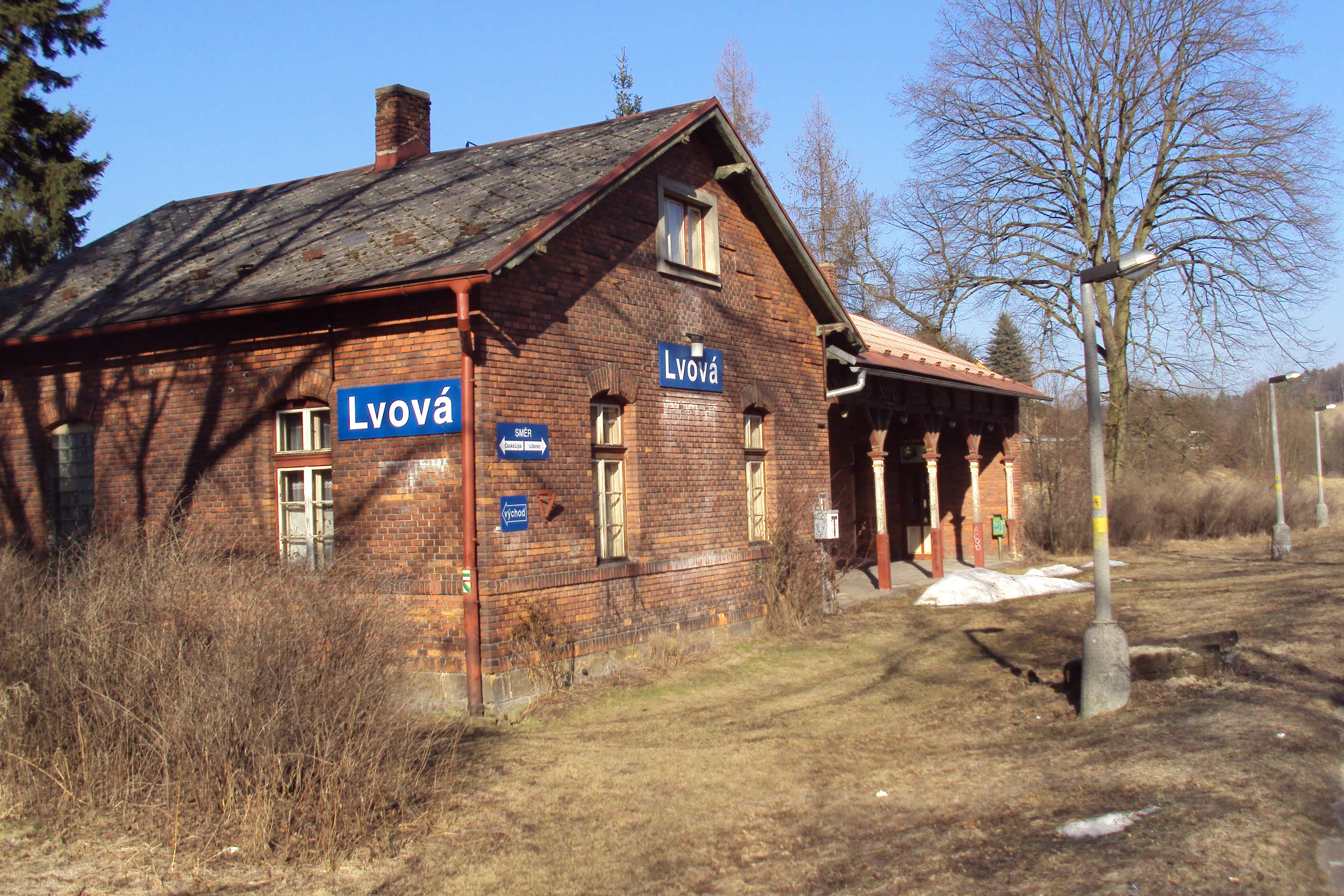 Železniční zastávka na trati z Liberce do České Lípy, bez obsluhy